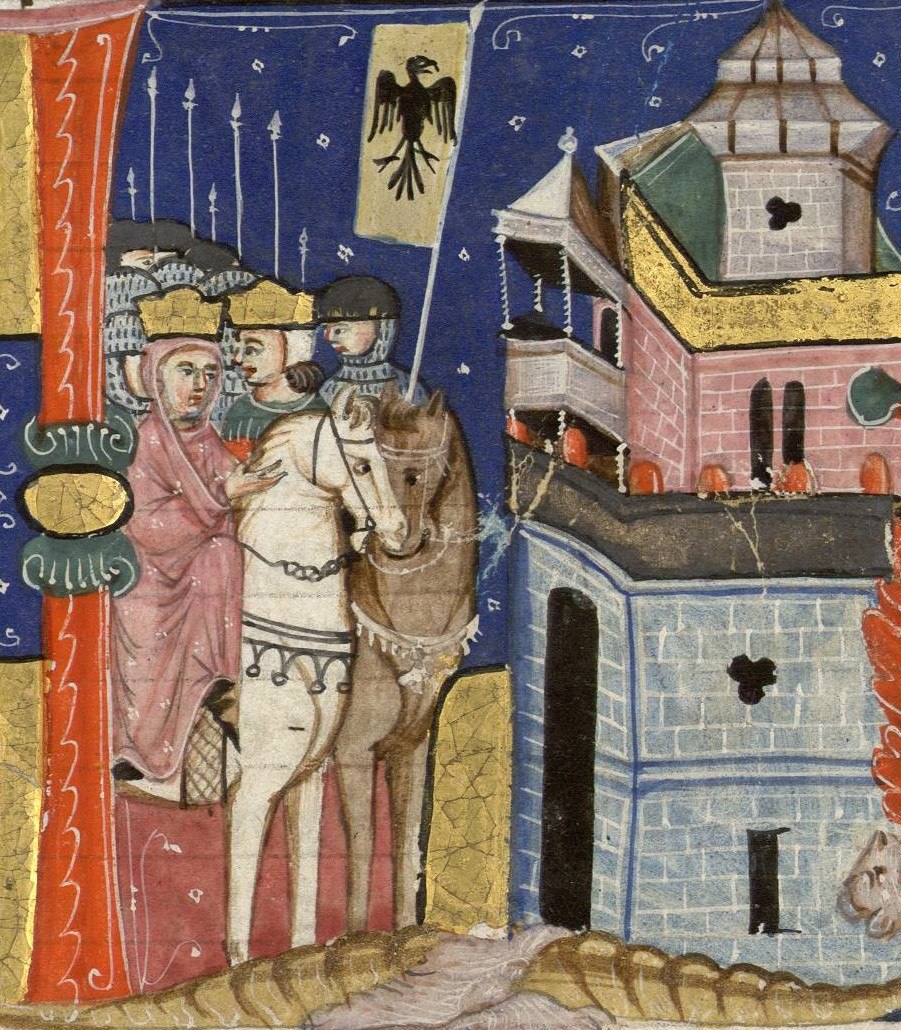 Gui de Lusignan devant Tyr